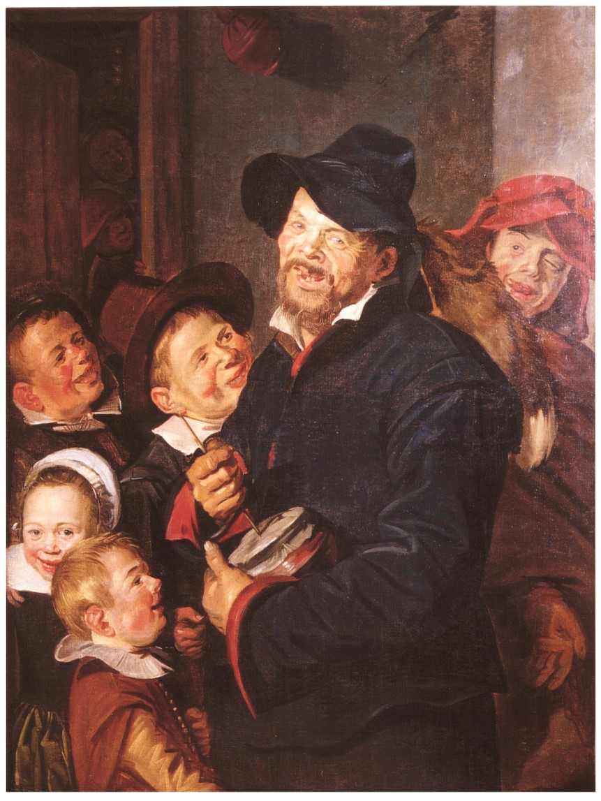 Der Rommelpotspieler mit 5 Kindern, 1618-1622, Öl/LW,Münchener Version,Privatbesitz, selbst fotogr. 2006, Lizenz selbst